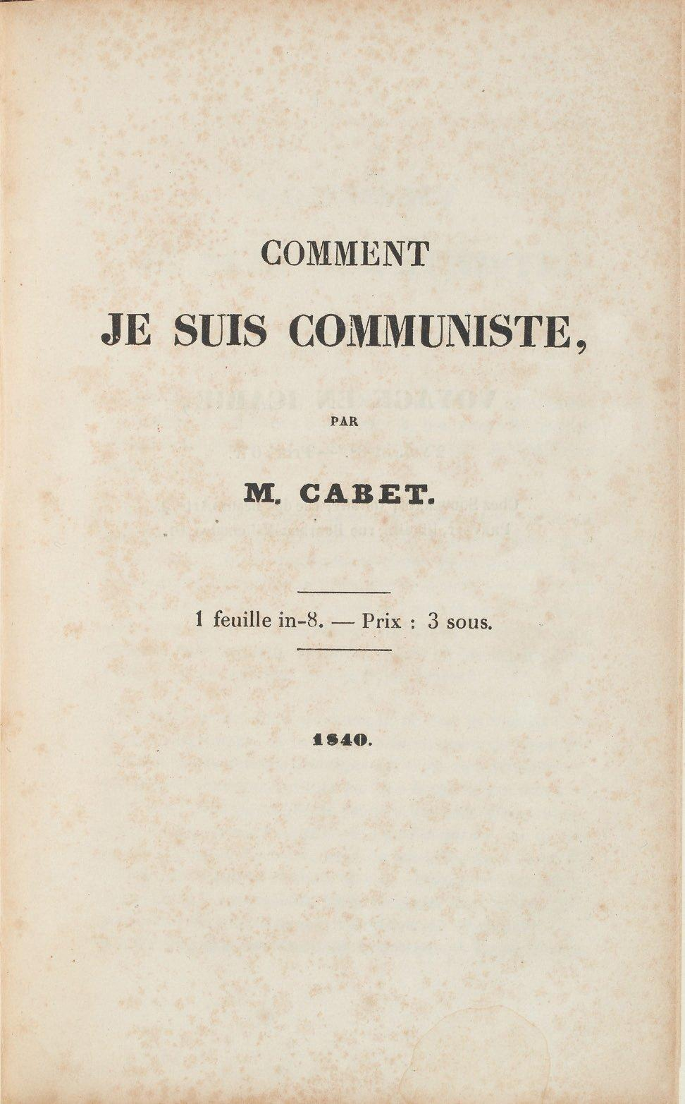 Couverture d'une brochure éditée par l'imprimerie Bourgogne et Martinet à Paris.